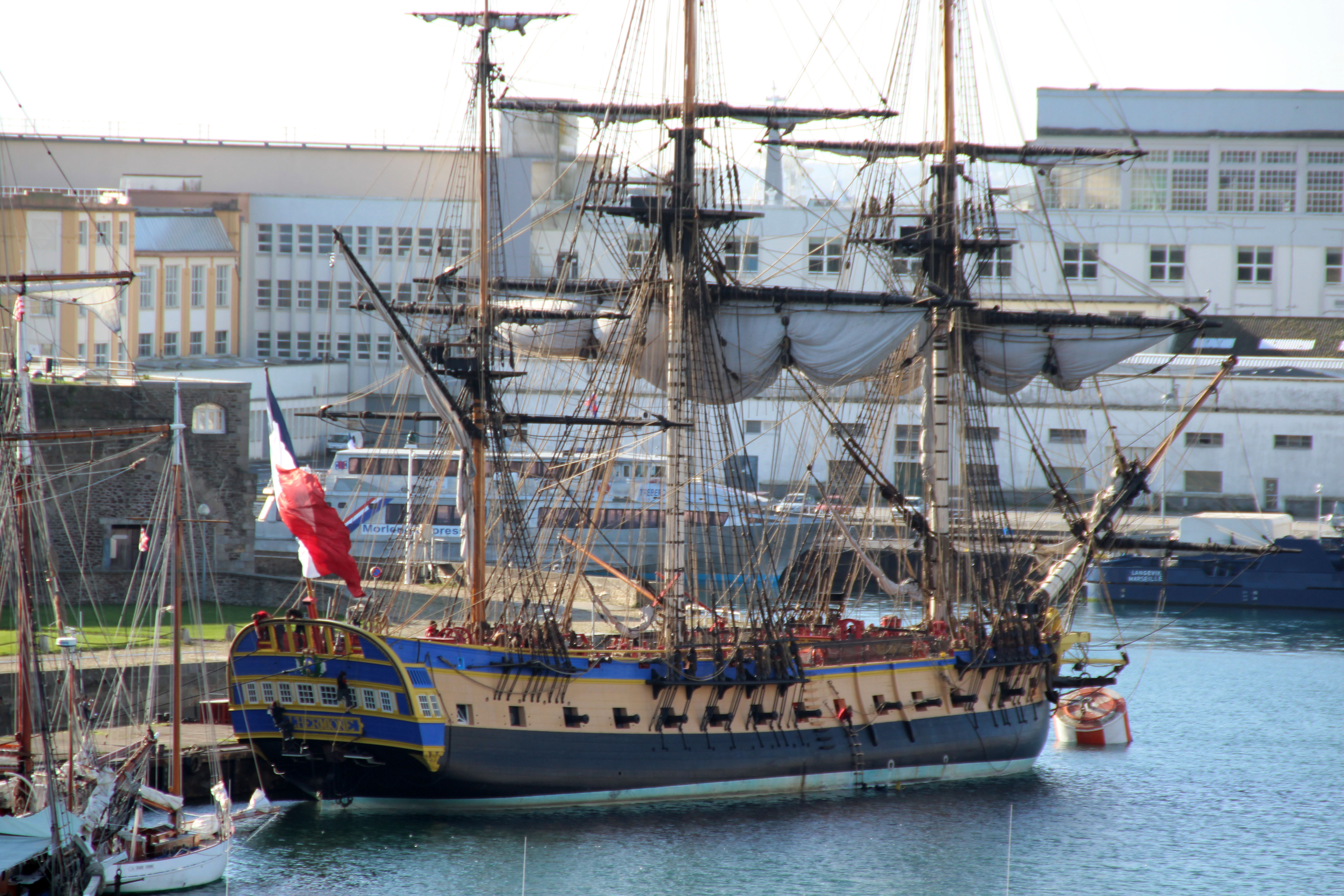 Frégate Hermione à quai à Brest le 1-11-2014